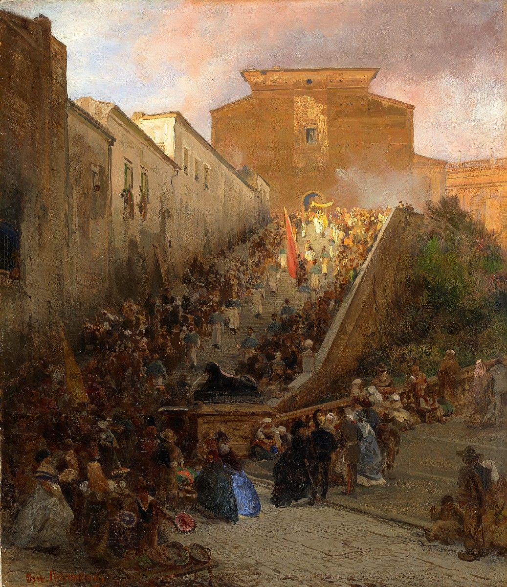 Prozession an der Kirche Santa Maria in Aracoeli in Rom. Signiert unten links: Osw. Achenbach. Öl auf Leinwand. 54 x 46,5 cm.